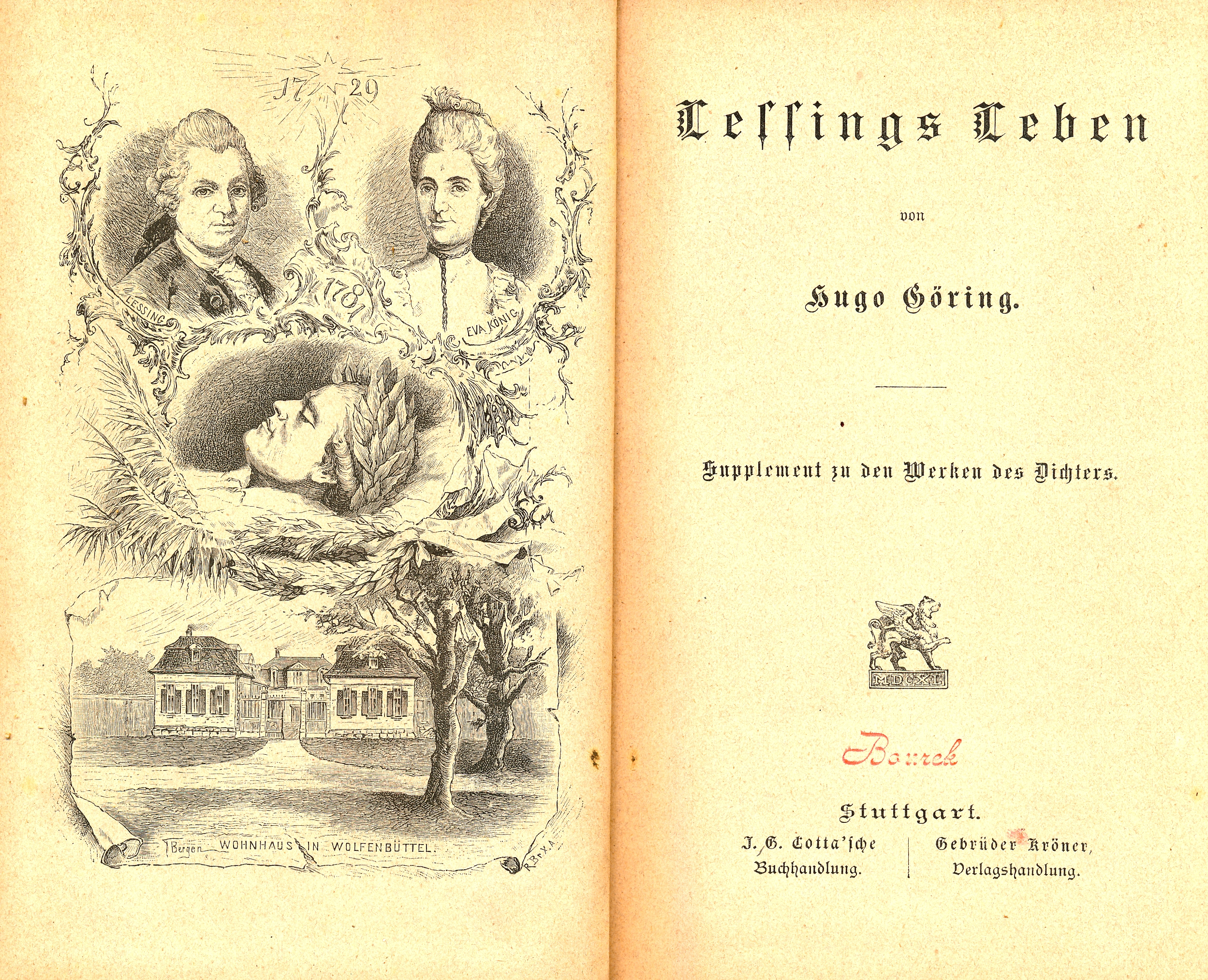 Hugo Göring: Lessings Leben, Cotta, Stuttgart 1881 (Doppel-Titelseite)